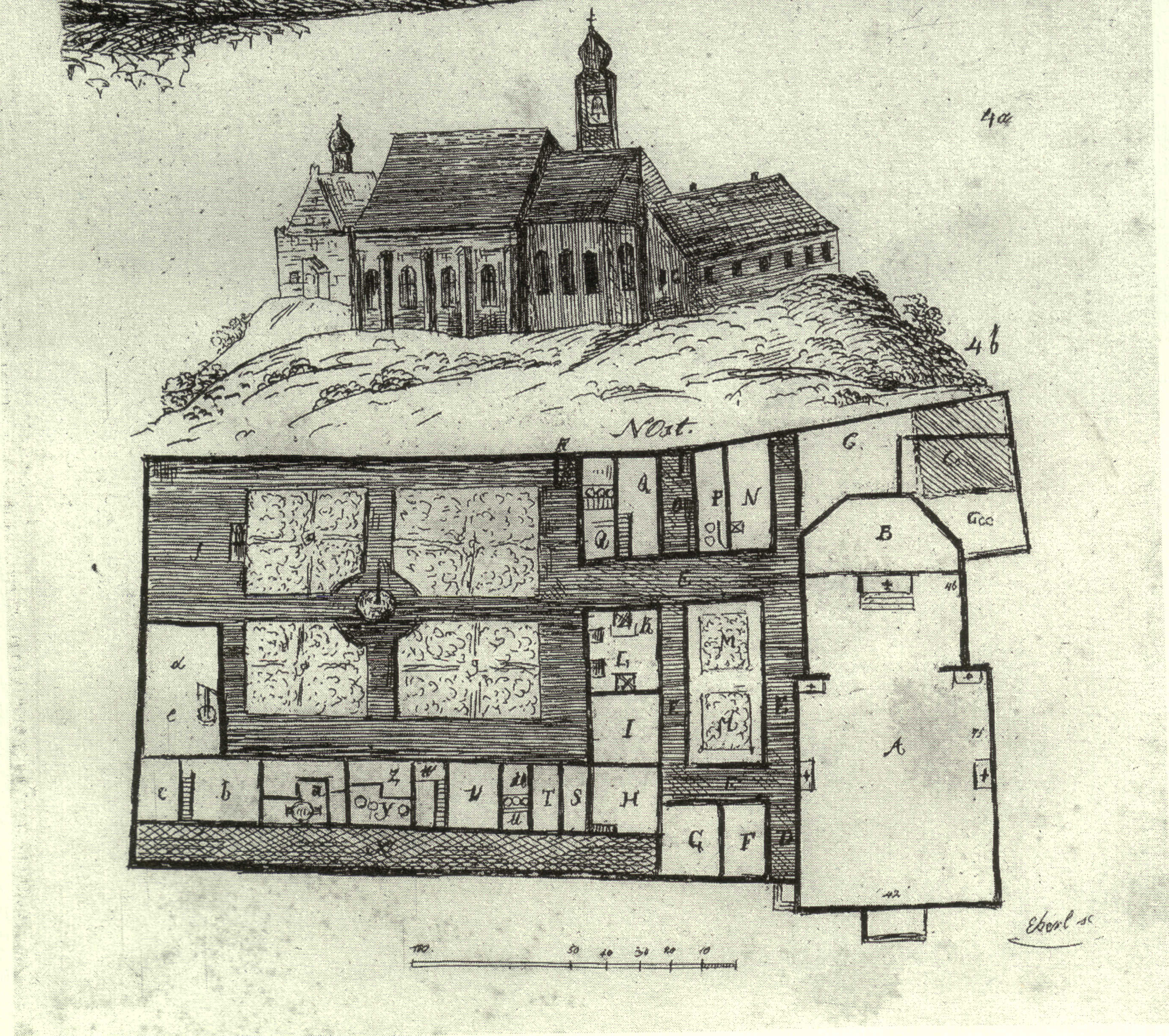 zeichnerische Darstellung des Franziskanerklosters Dingolfing vor dessen Abbruch 1802